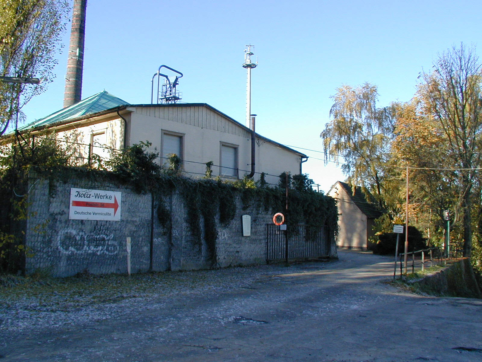 Gebäude der ehemaligen Haßlinghauser Hütte in Sprockhövel-Haßlinghausen